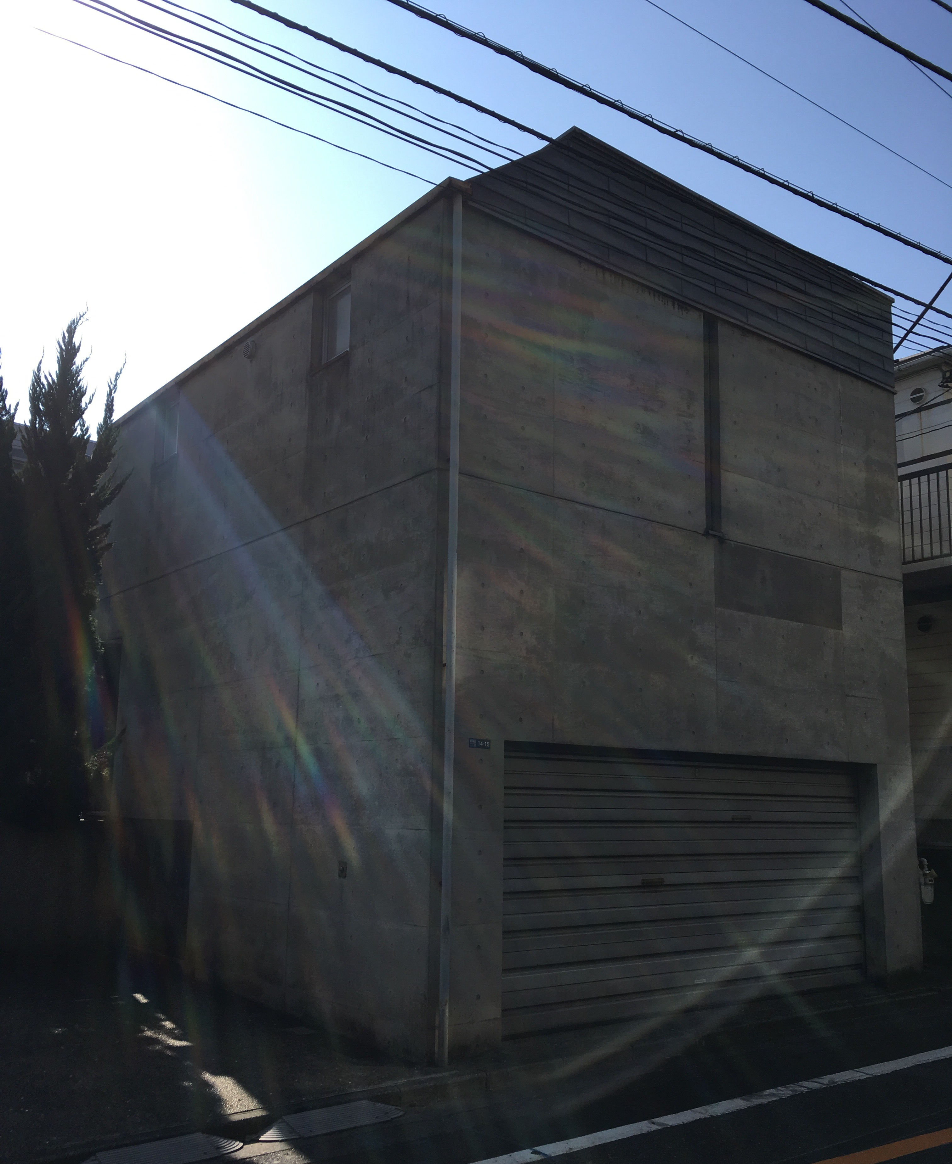 宮脇檀の建築作品